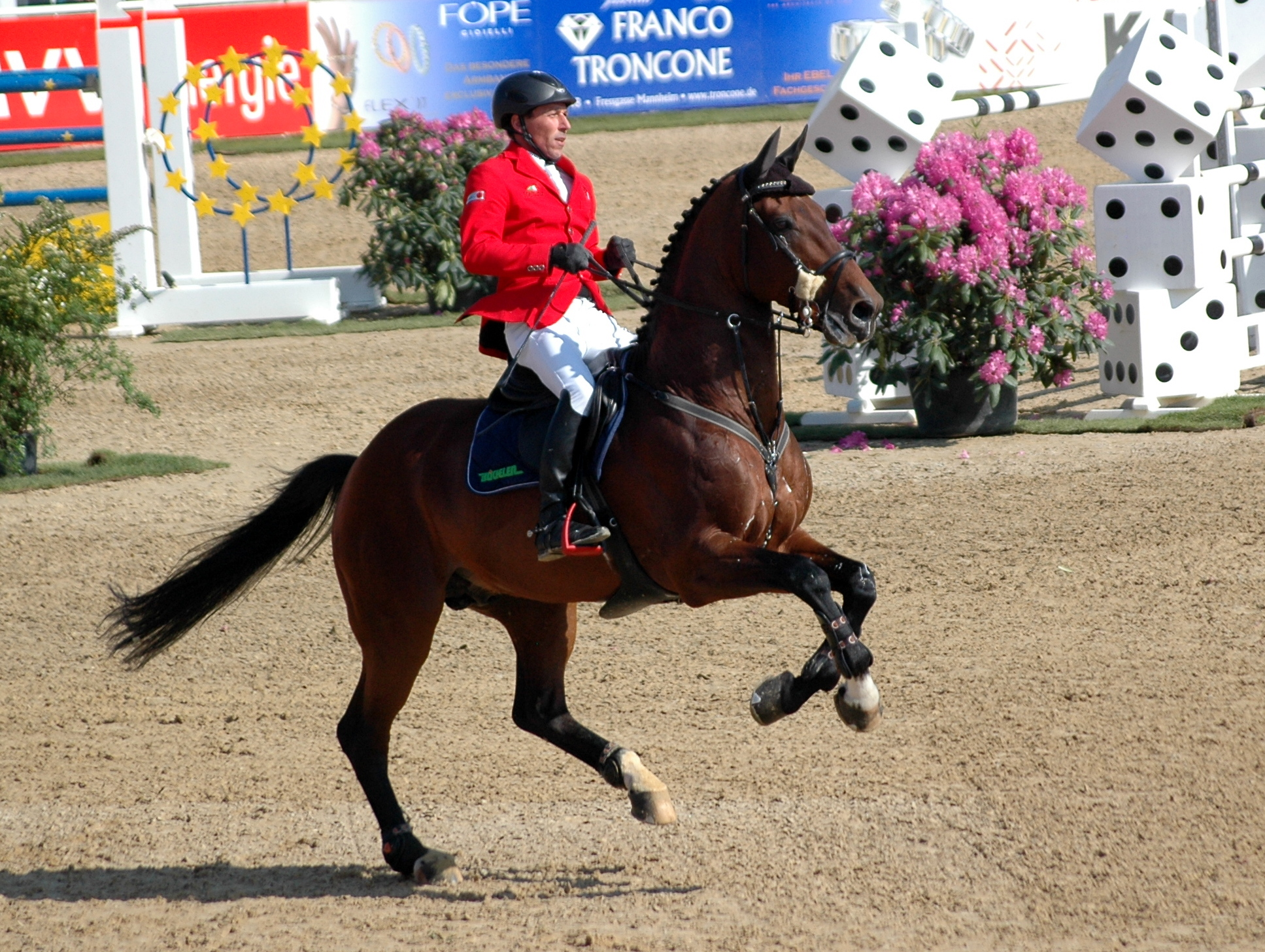 51. Maimarkt-Turnier: Hans-Dieter Dreher mit Colore